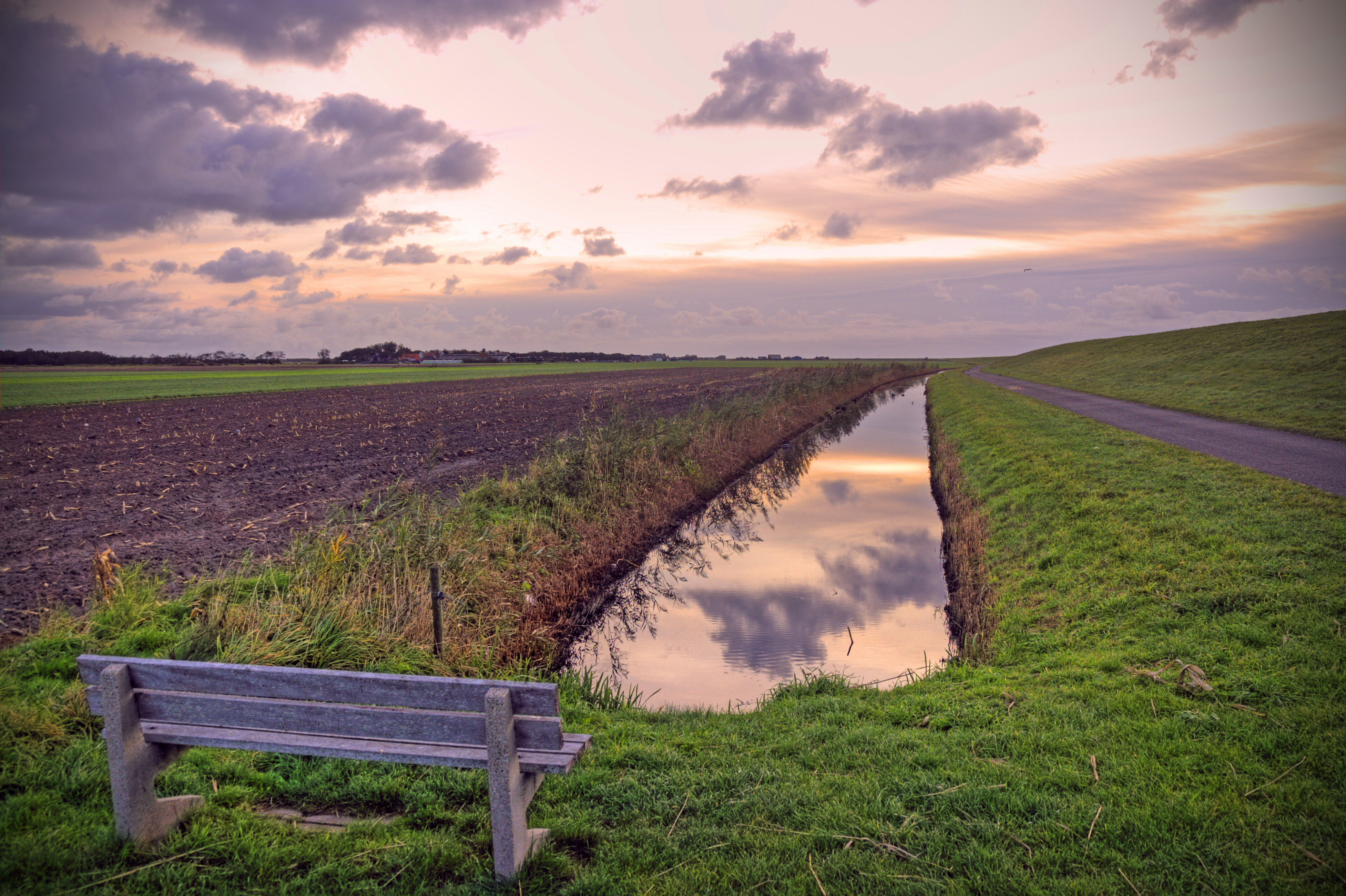 Sunrise on Schiermonnikoog island